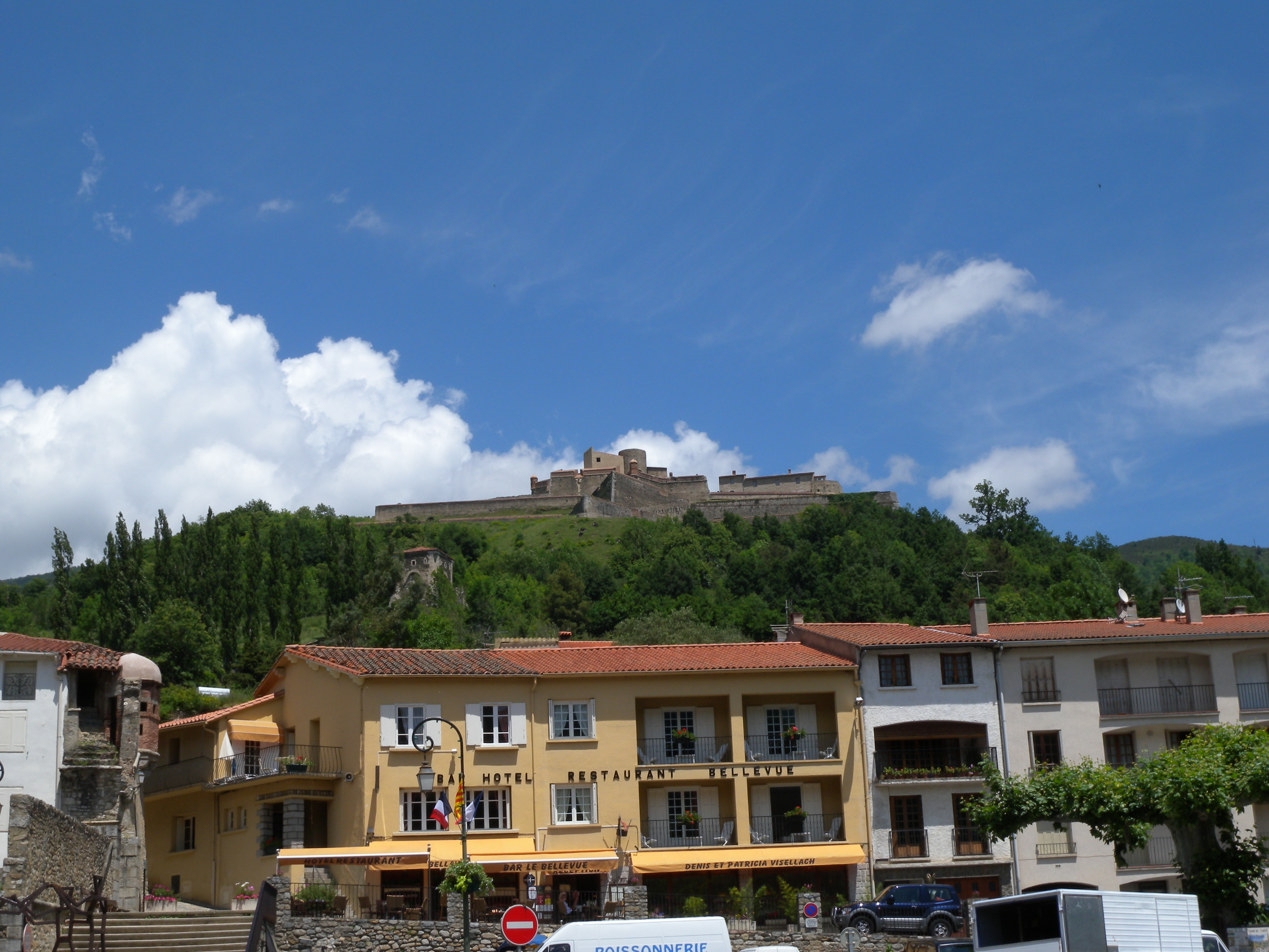 Prats-de-Mollo (Pyrénées-Orientales, France)